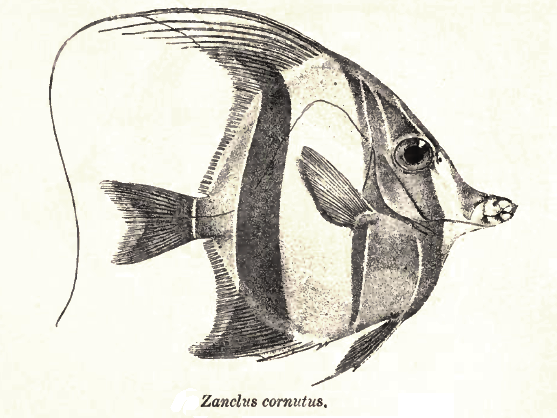 Zanclus cornutus (Linnaeus, 1758)